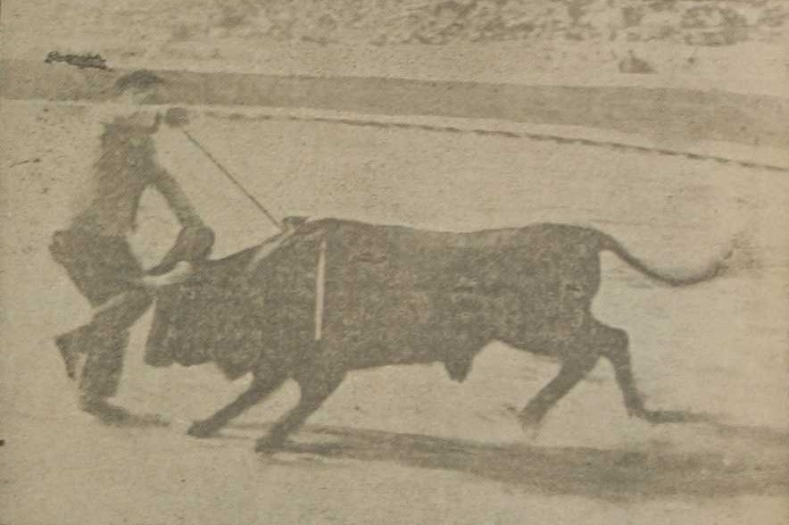 K-Hito entrando a matar a un toro durante una corrida en Valencia